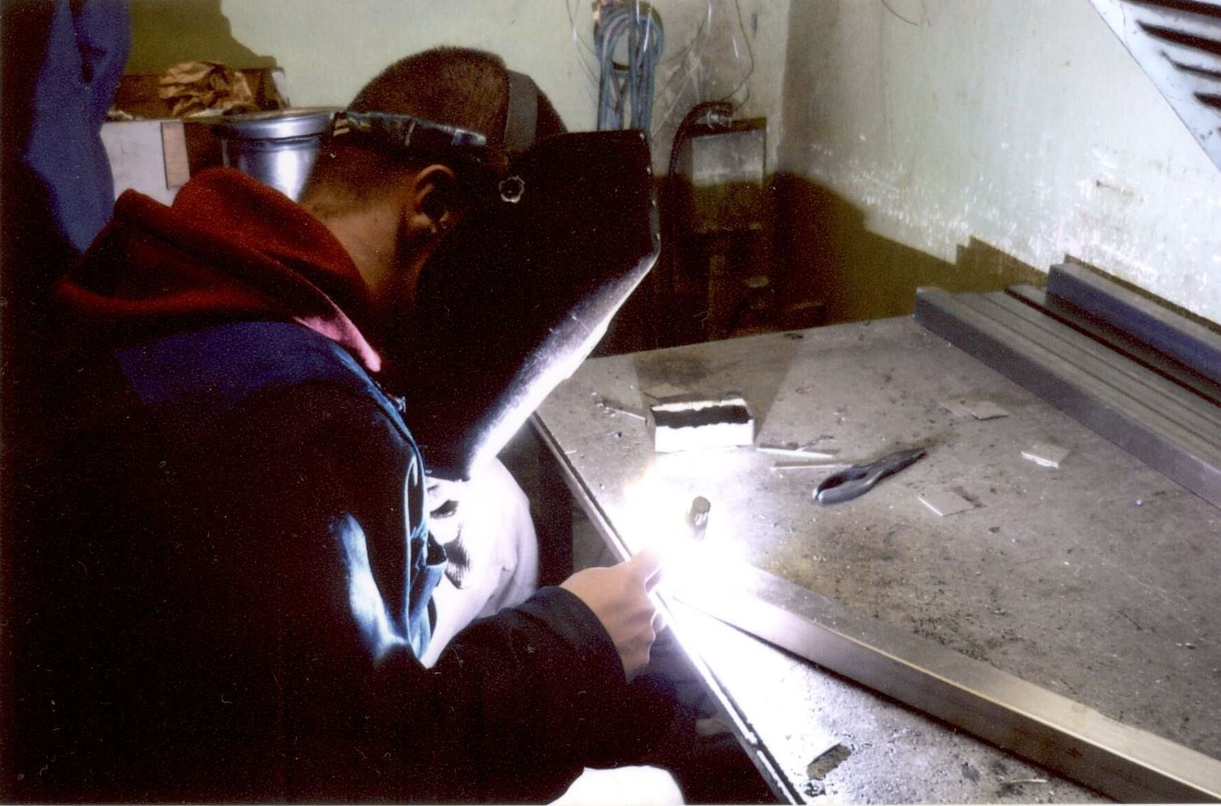 Лаборатория сварки в г. Королев